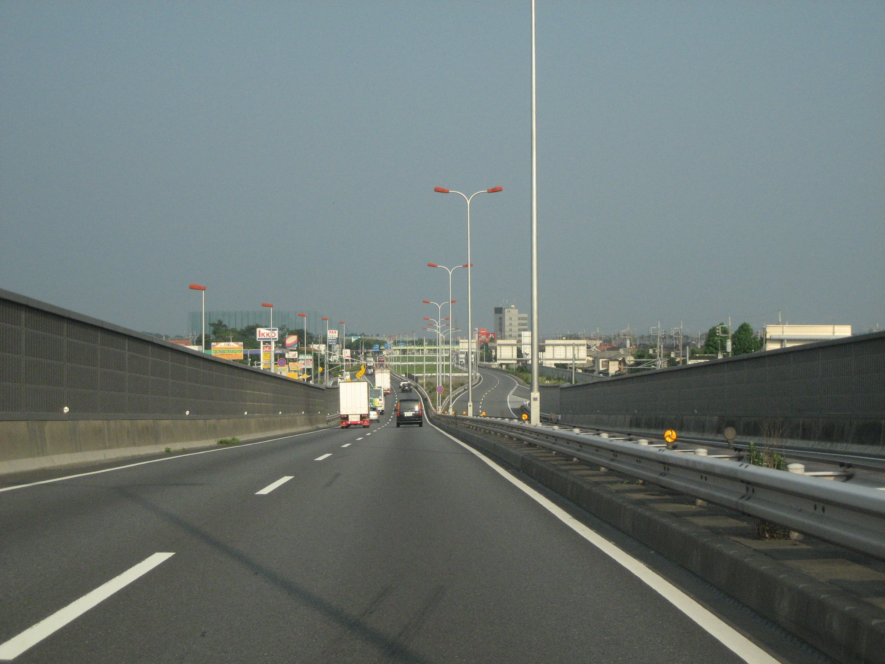 国道17号線熊谷バイパス（埼玉県熊谷市上之付近）